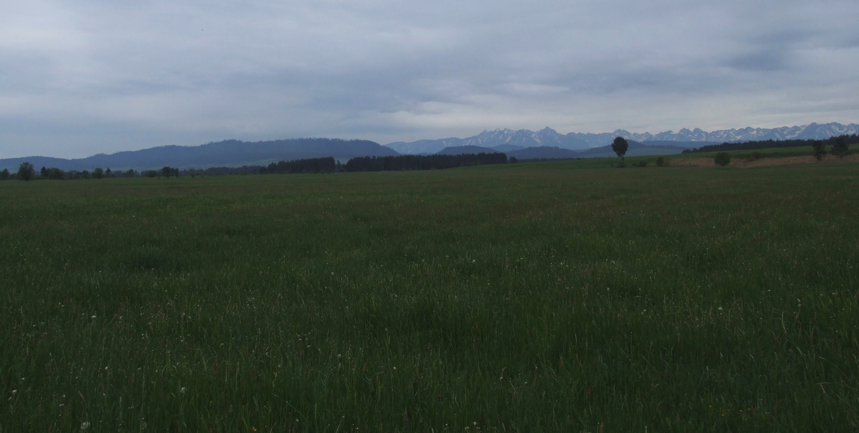 Kotlina Nowotarska w okolicy Krempach. Widoczne Pieniny Spiskie i Tatry